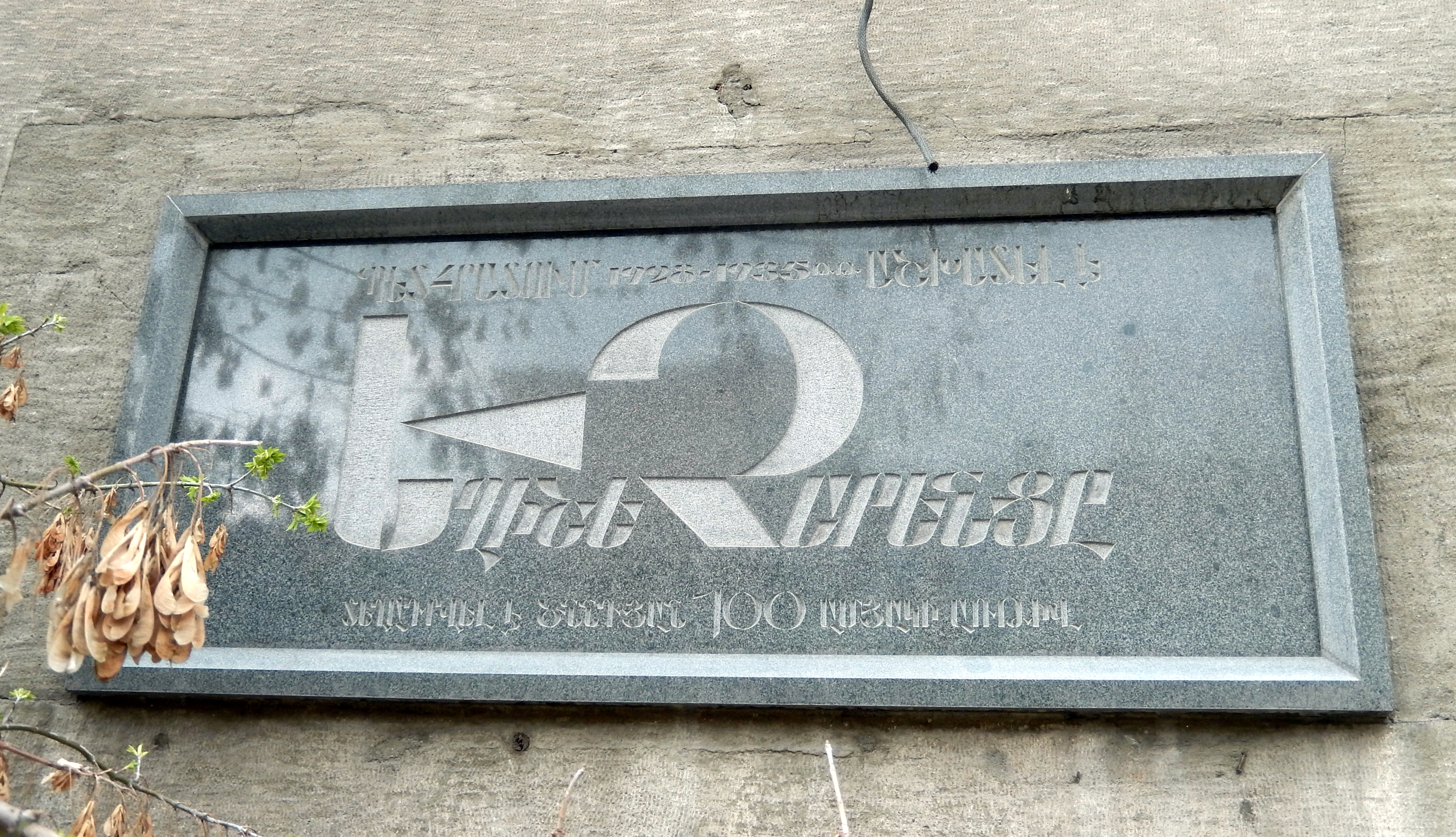 Եղիշե Չարենցի հուշատախտակ 6/231